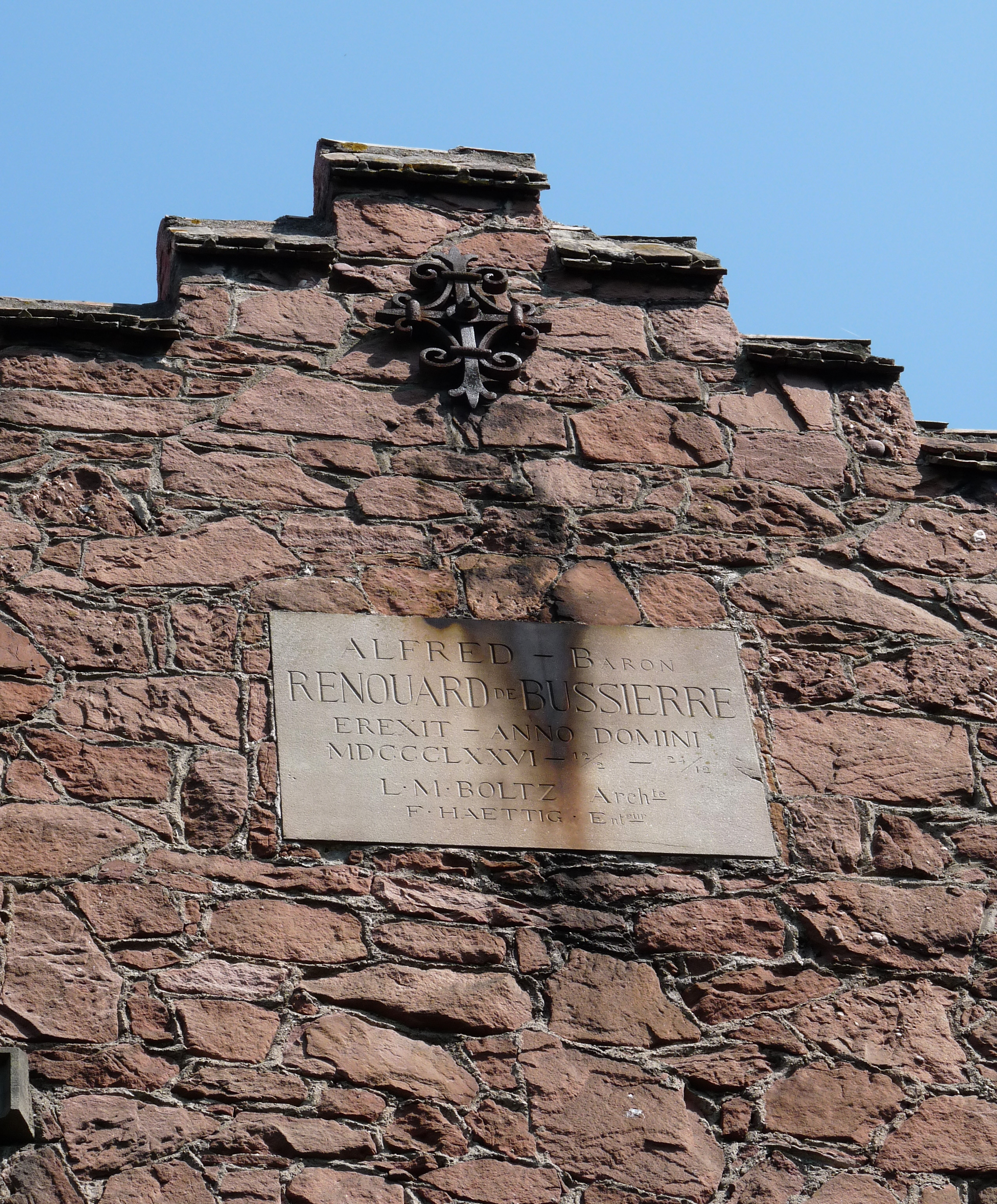 La Ferme Bussière à la lisière du parc de Pourtalès (Robertsau, Strasbourg). Alfred Renouard de Bussière la fit ériger en 1867. Architecte : Louis-Michel Boltz. Aujourd'hui Centre d'Initiation à l'Environnement